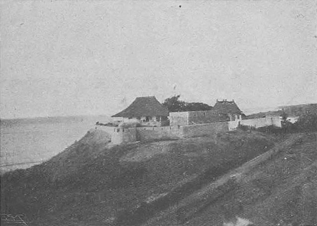 Fort de Lautém